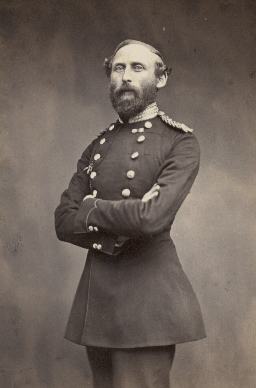 Frederik Christian Stiernholm (1822-1879), Danish General